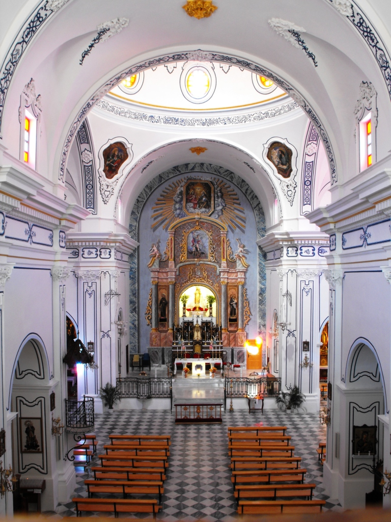 Vista del interior de la Basílica de Nuestra Señora de las Mercedes (Oria, Almería). Pintada por el pintor macaelense Juan Guevara Fernández